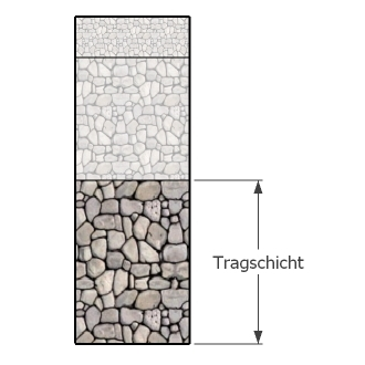 Straßenaufbau mit Darstellung der Tragschicht